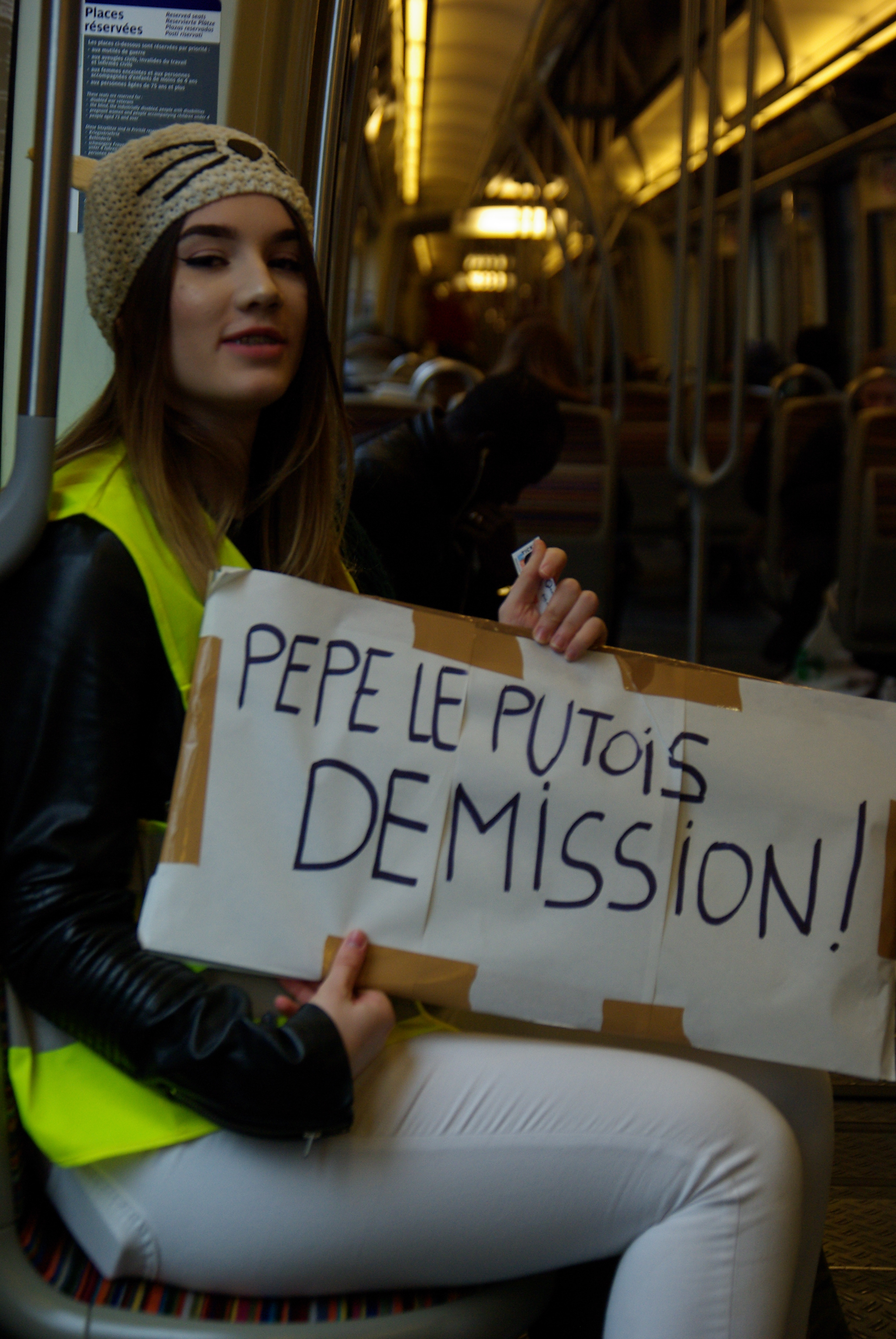 A yellow vest for Emmanuel Macron's resignation as President of France in the parisian suburbs